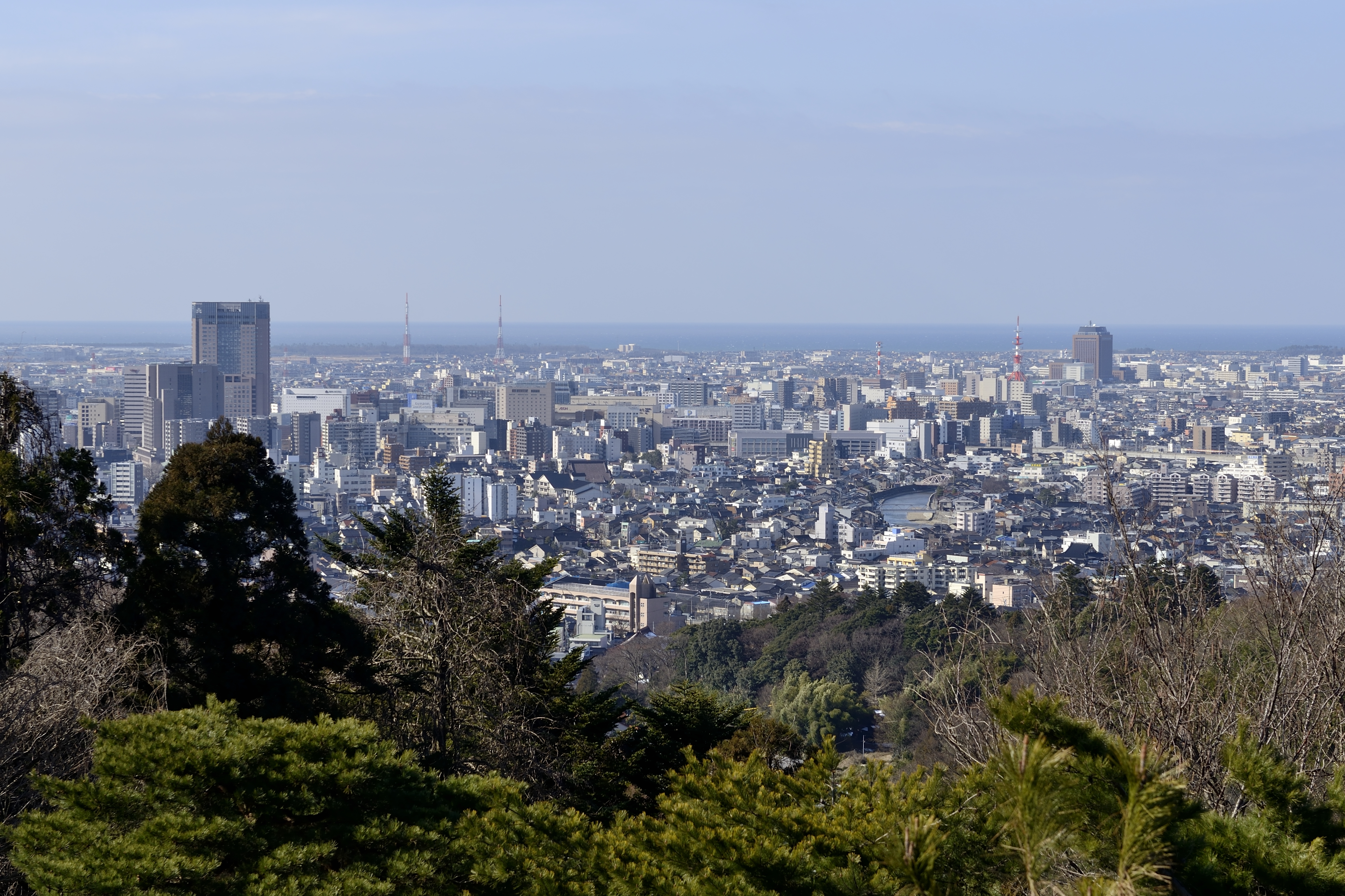 望湖台